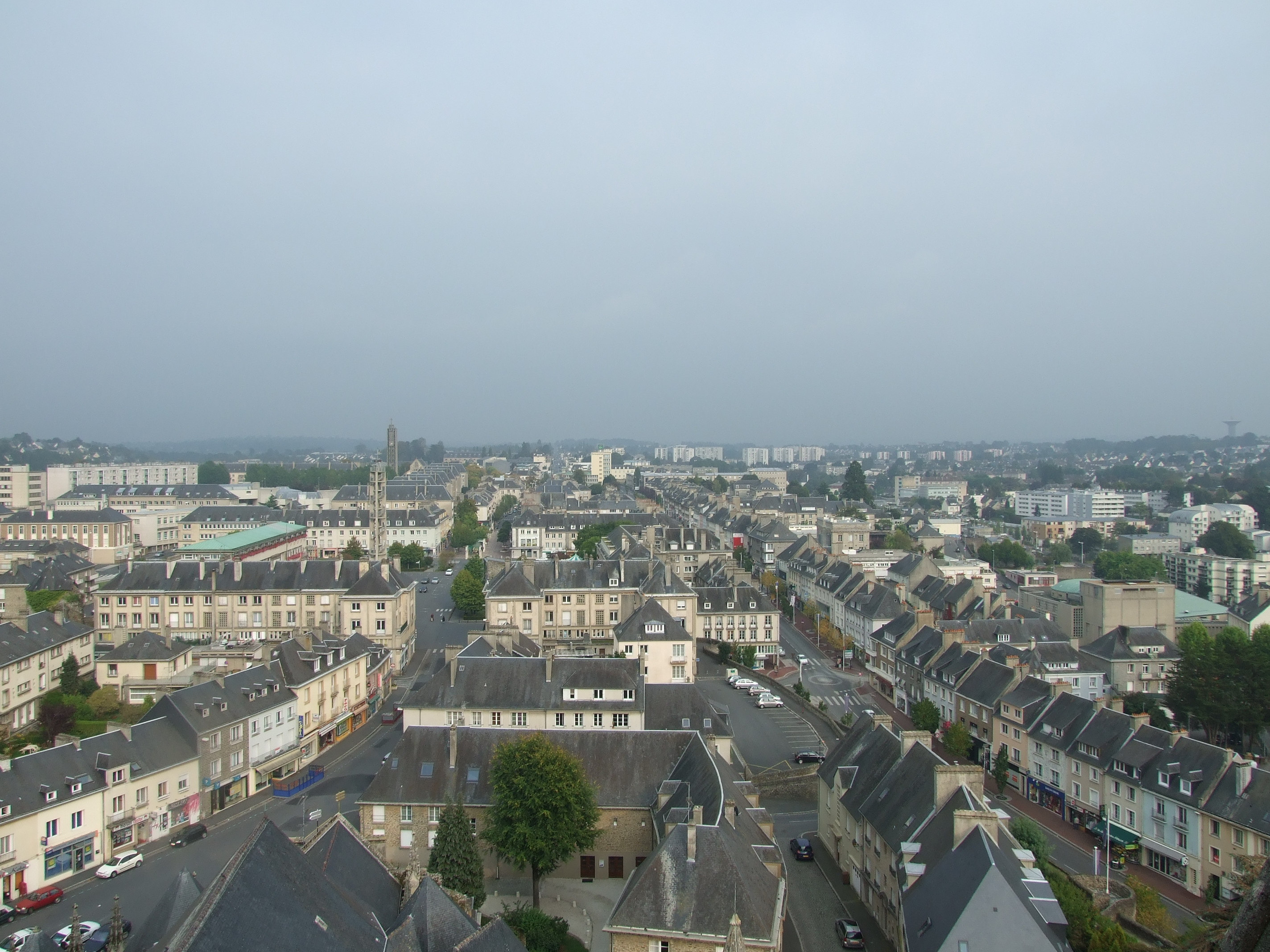 Vue Est depuis Notre-Dame de Saint-Lô.